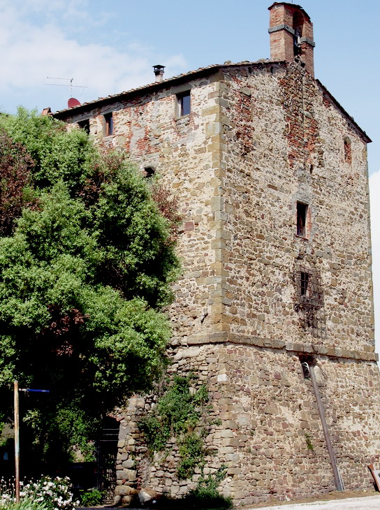 Torre d'Alma (Castiglione della Pescaia)